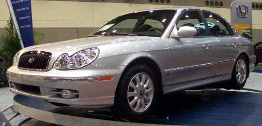 Hyundai Sonata (Year 2002)